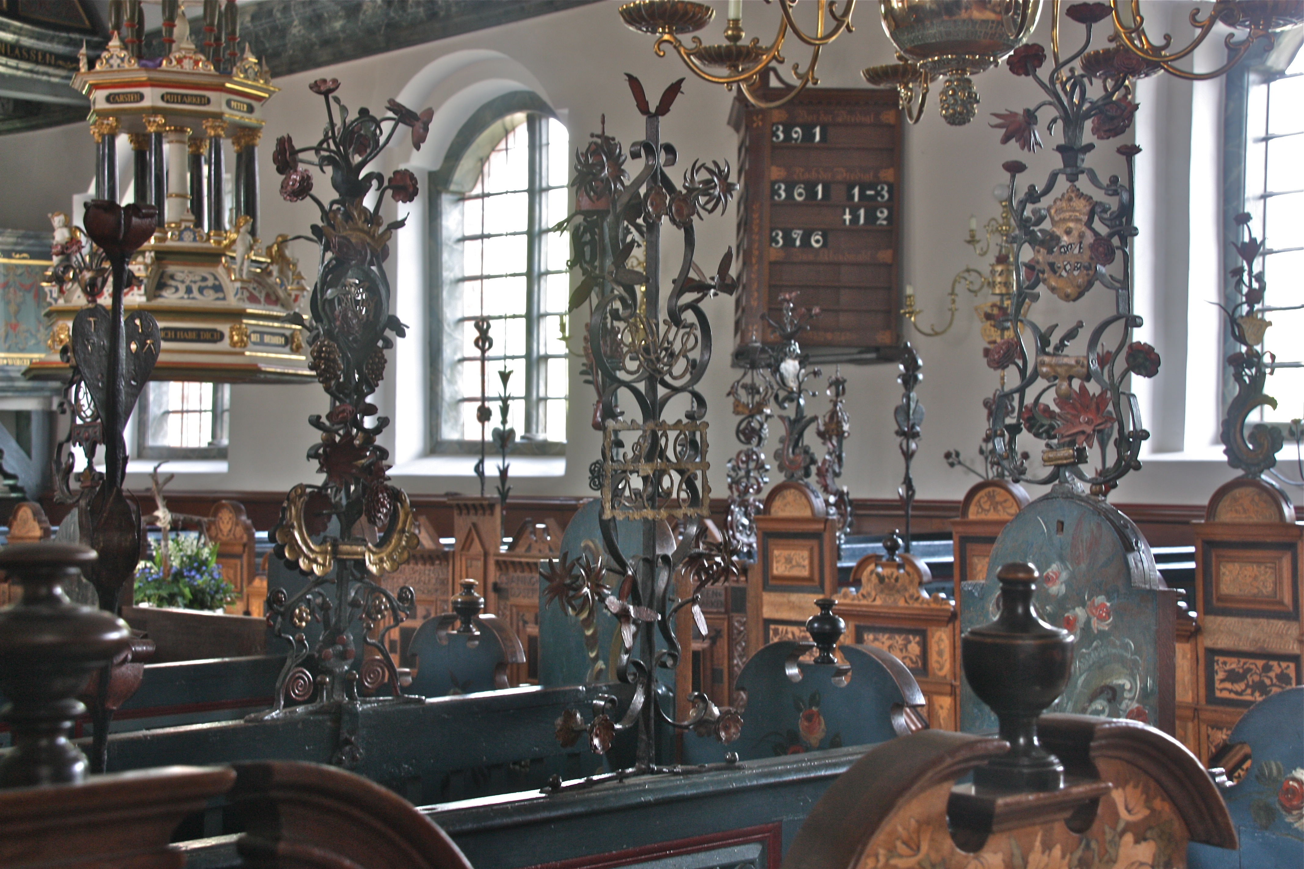 Hamburg, Altengamme, Kirche St. Nicolai, Hutständer This is a photograph of an architectural monument.